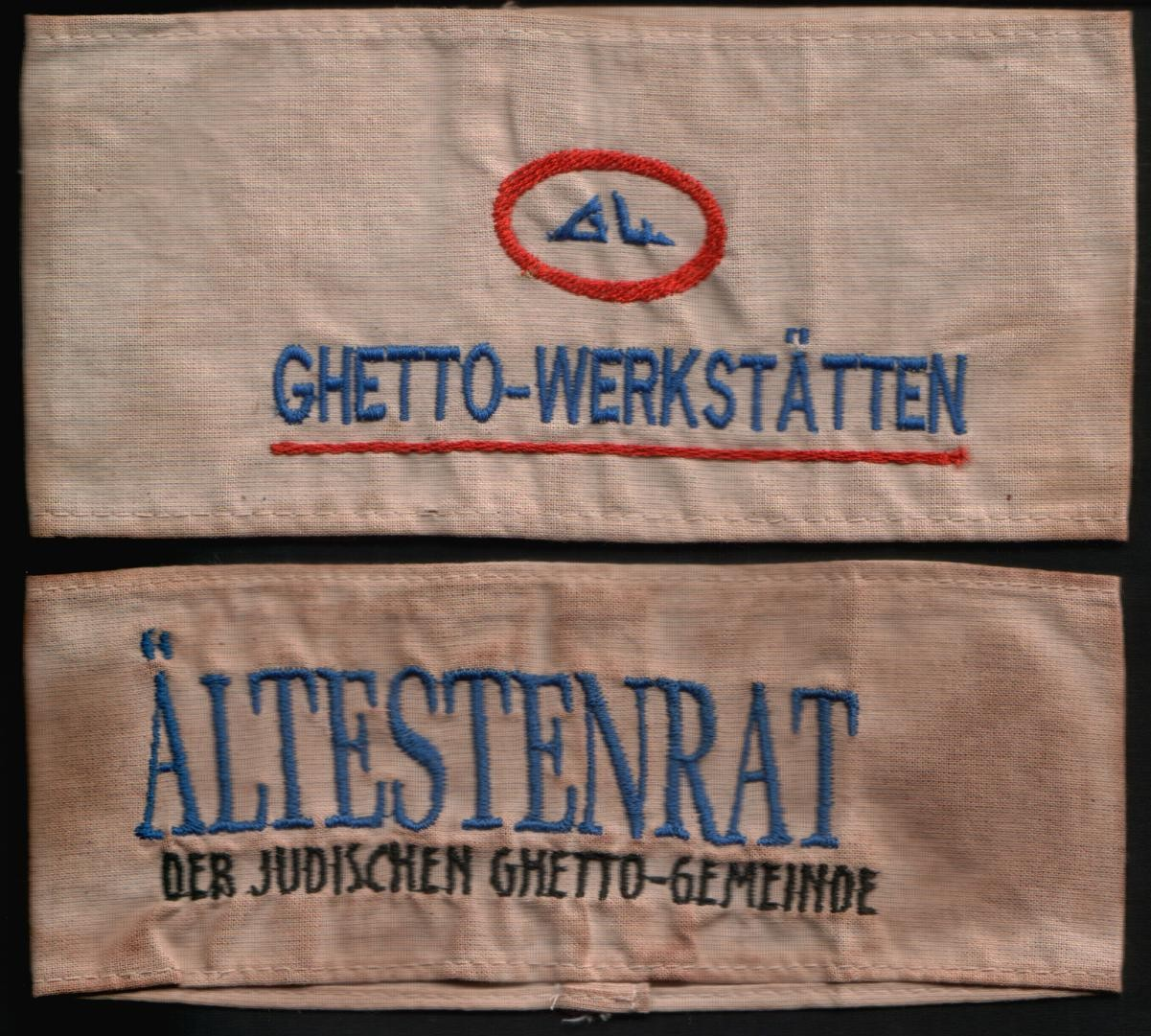 Armbinden aus einem jüdischen Ghetto Privatbesitz des Bilderstellers Norbert Luffy, D-52223 Stolberg NORLU 07:56, 22 February 2007 (UTC)